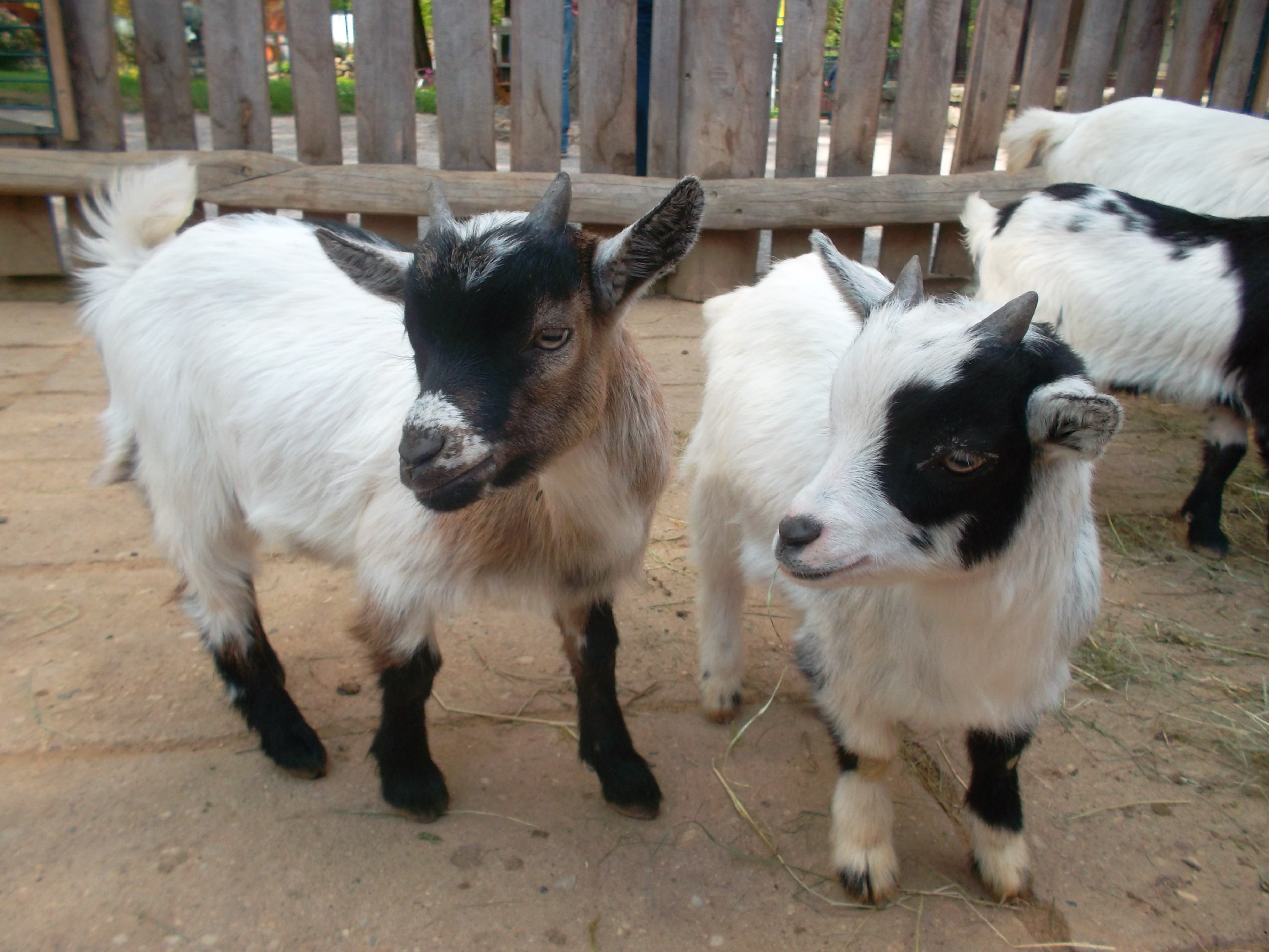 2 junge Hausziegen im Tierpark der Stadt Bischhofswerda